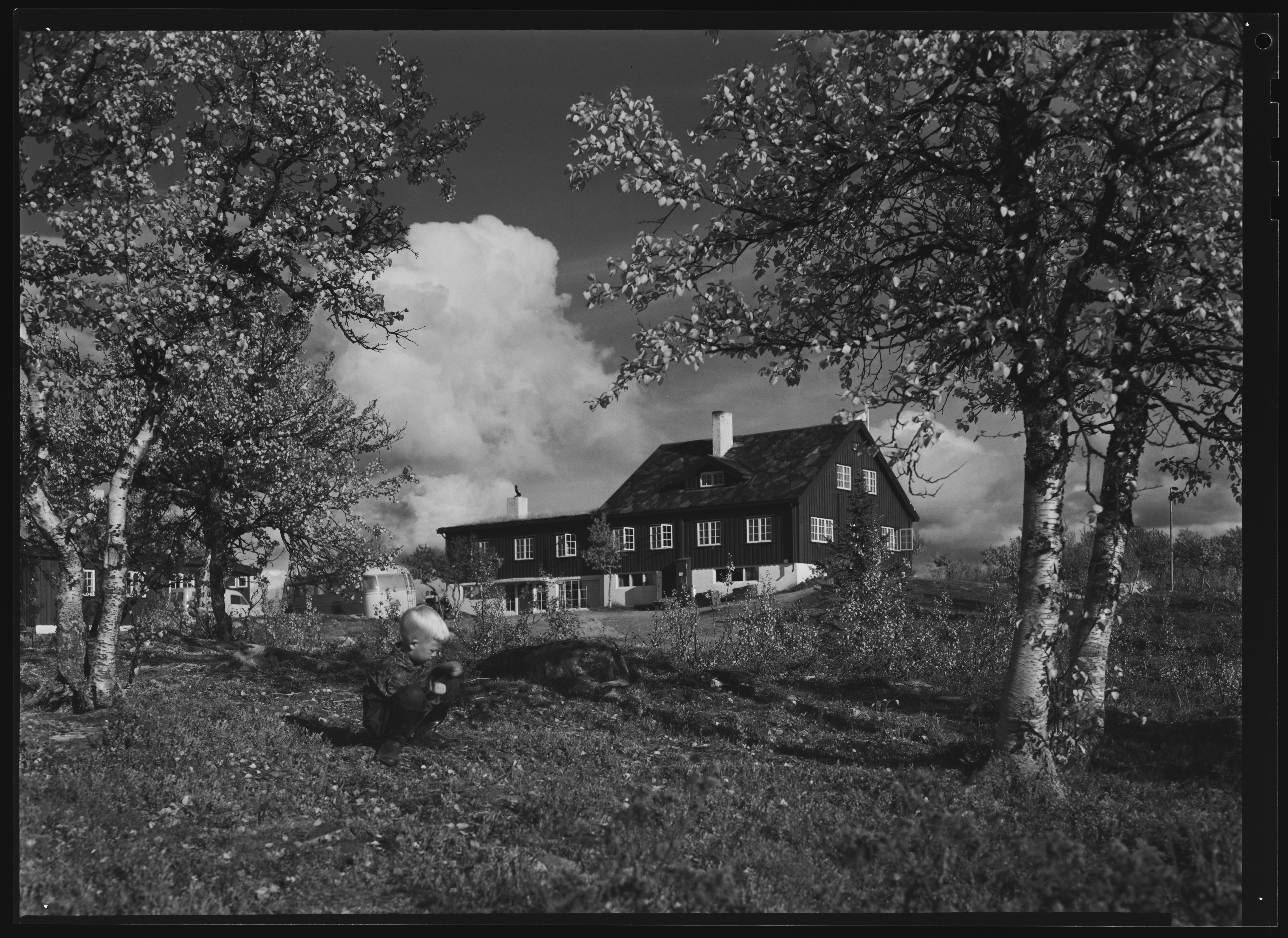 Bildet er hentet fra Nasjonalbibliotekets bildesamling Venabu, Ringebu, Oppland